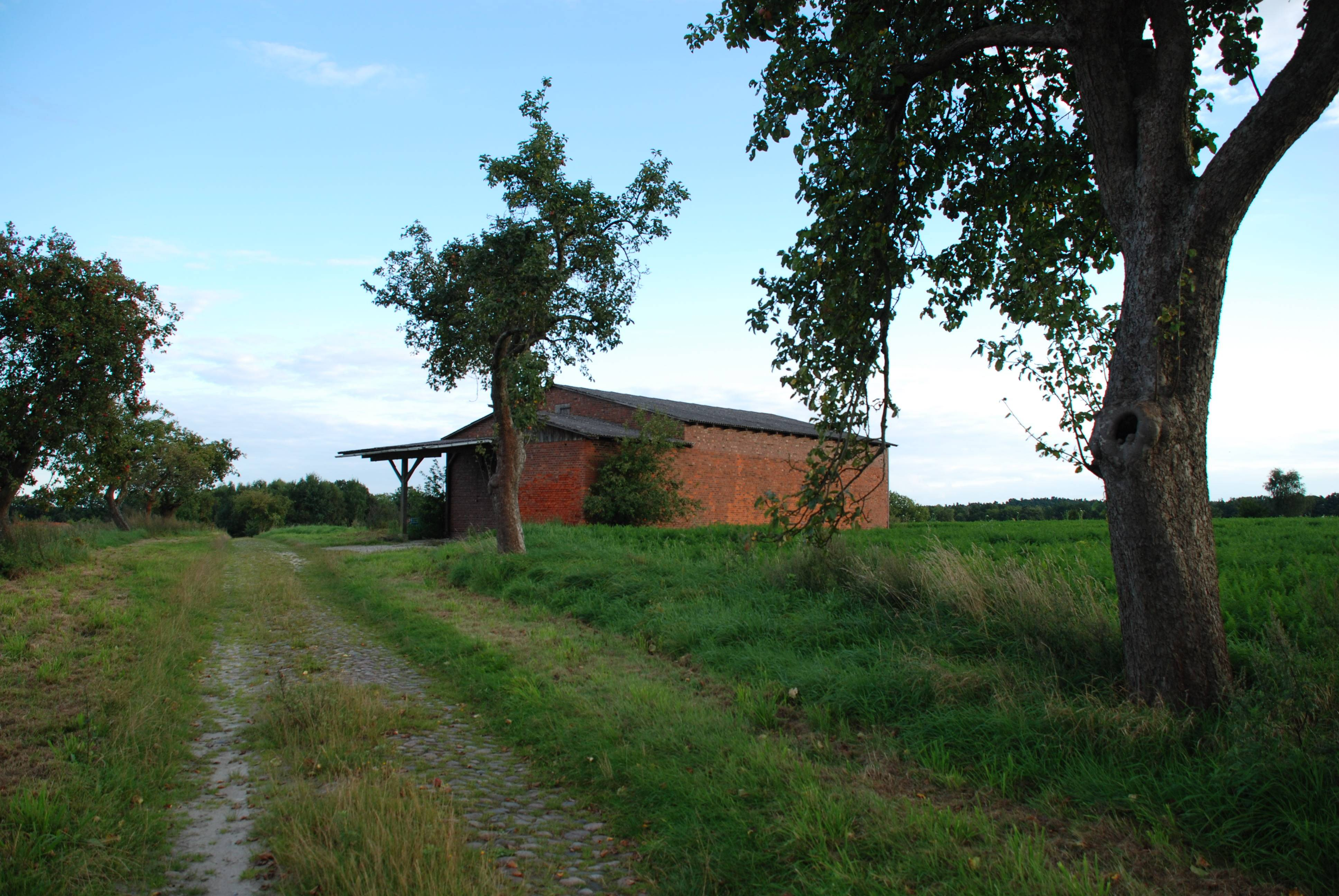 Räber - Scheune Osterfeuer